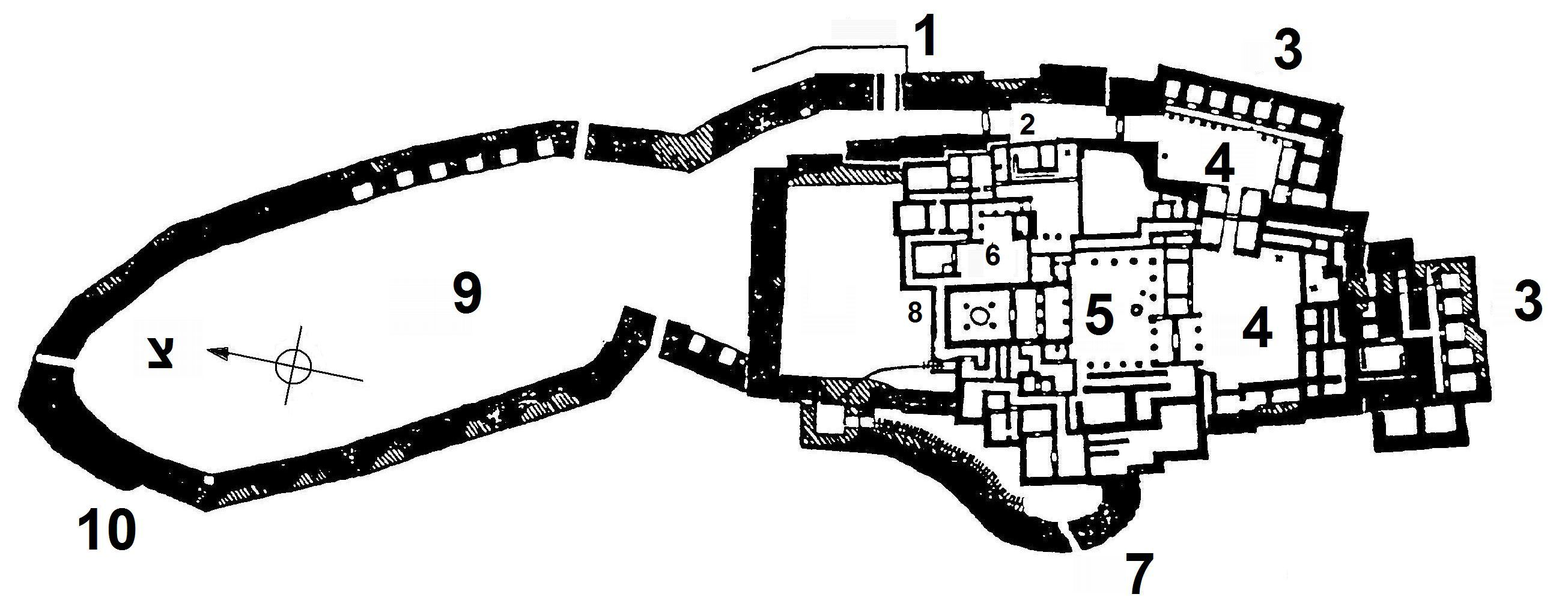 eigen werktekening